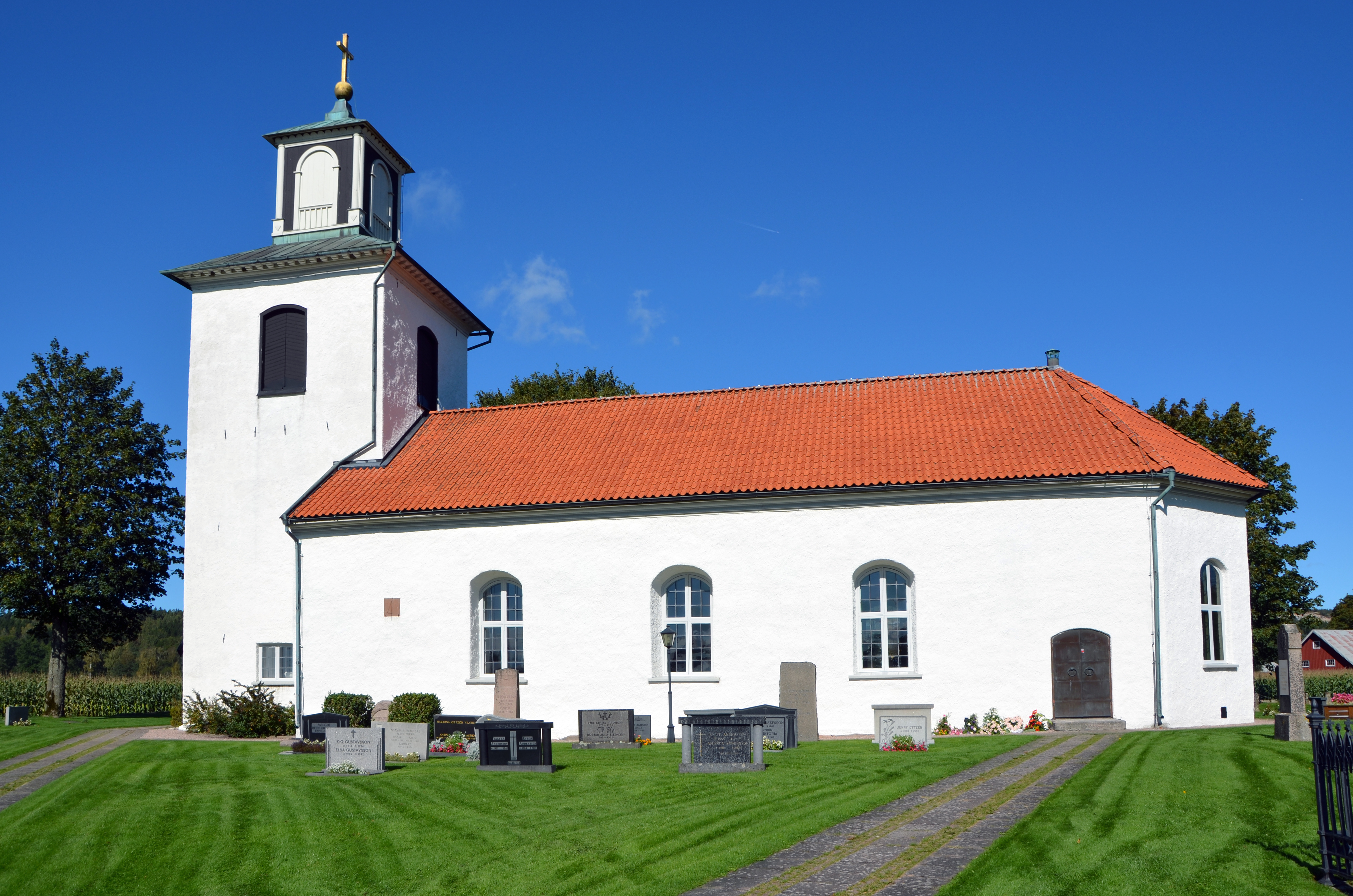 Marbäcks Kirche, Skara Stift